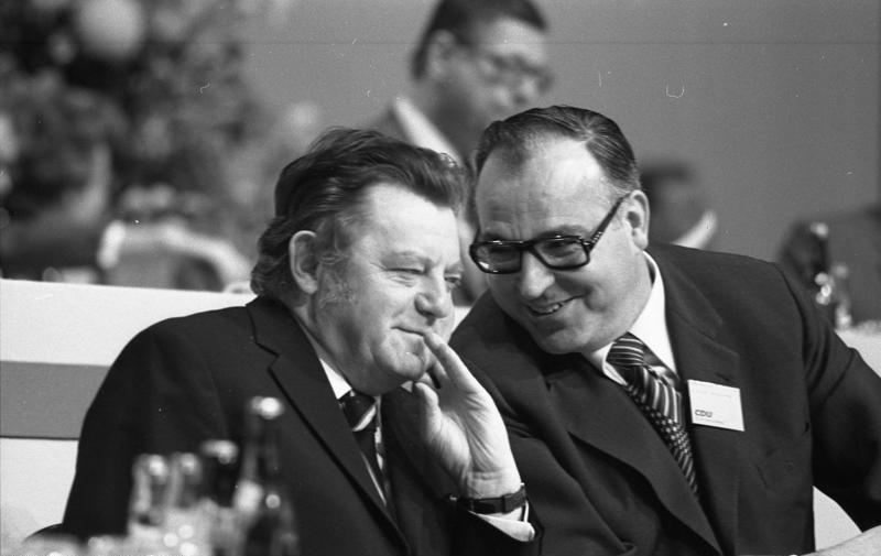 22. Bundesparteitag der CDU in Hamburg (links: Franz Josef Strauß, rechts: Helmut Kohl) 18.-20.11.1973